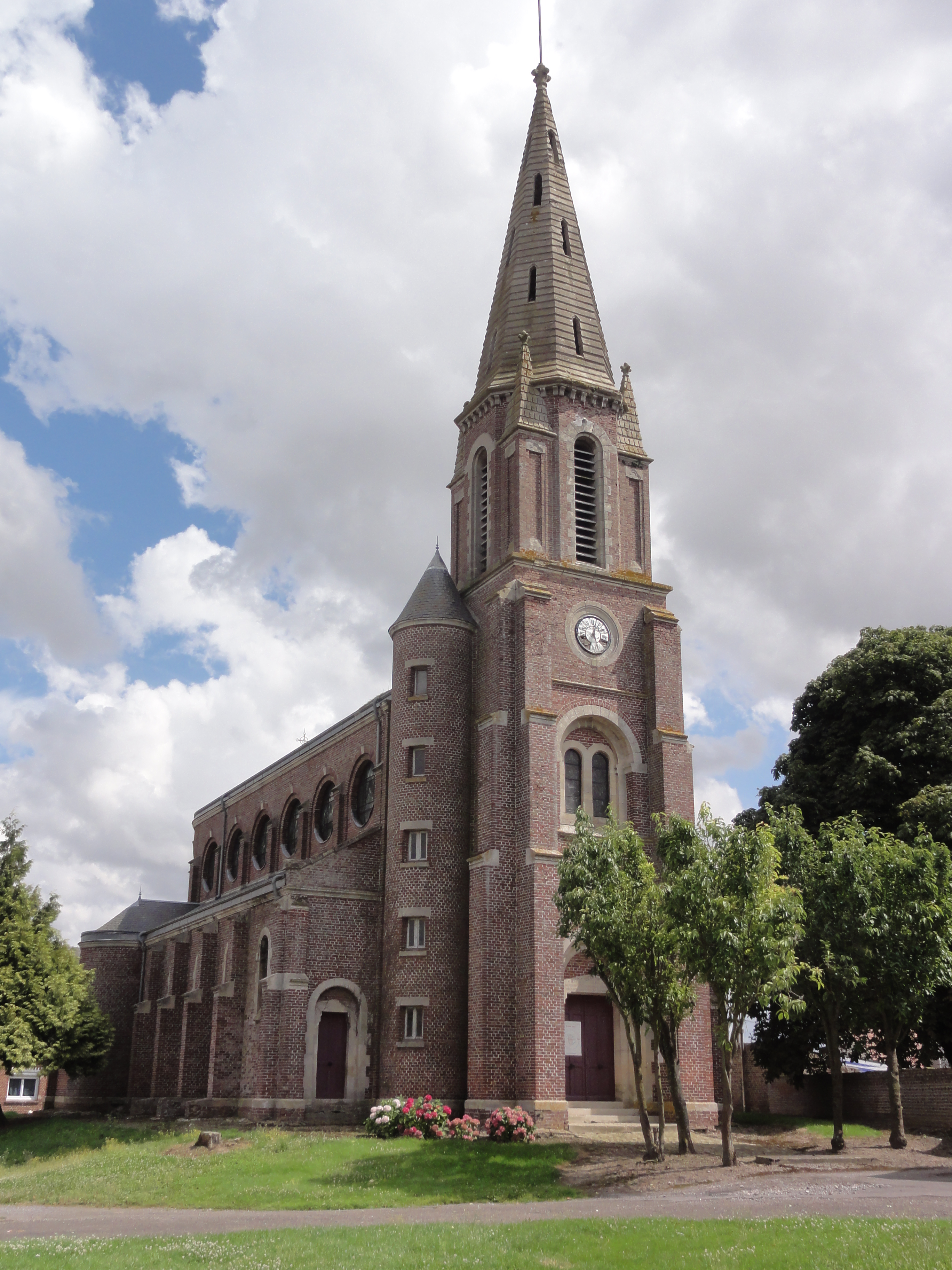 Douchy (Aisne) église Saint-Laurent